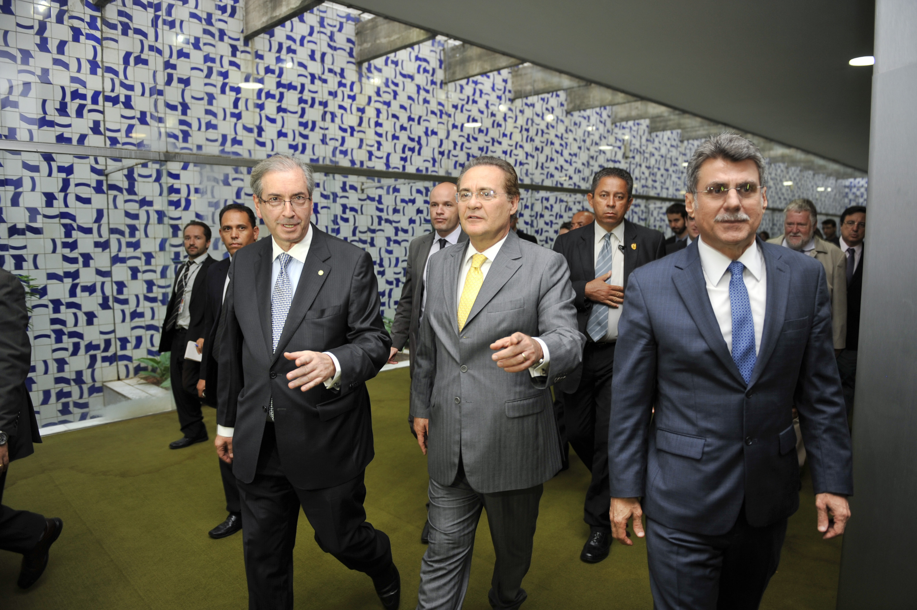 Presidente do Senado Federal, senador Renan Calheiros (PMDB-AL), senador Romero Jucá (PMDB-RR) e o presidente da Câmara dos Deputados, Eduardo Cunha caminham pelo salão verde, no Congresso Nacional. Foto: Jonas Pereira/Agência Senado